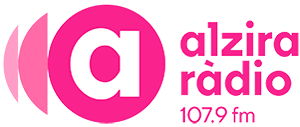 Alzira Ràdio